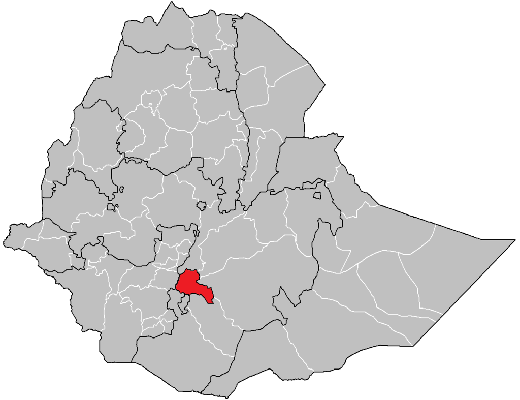 地図を参考に、シダマ県の位置（2019）